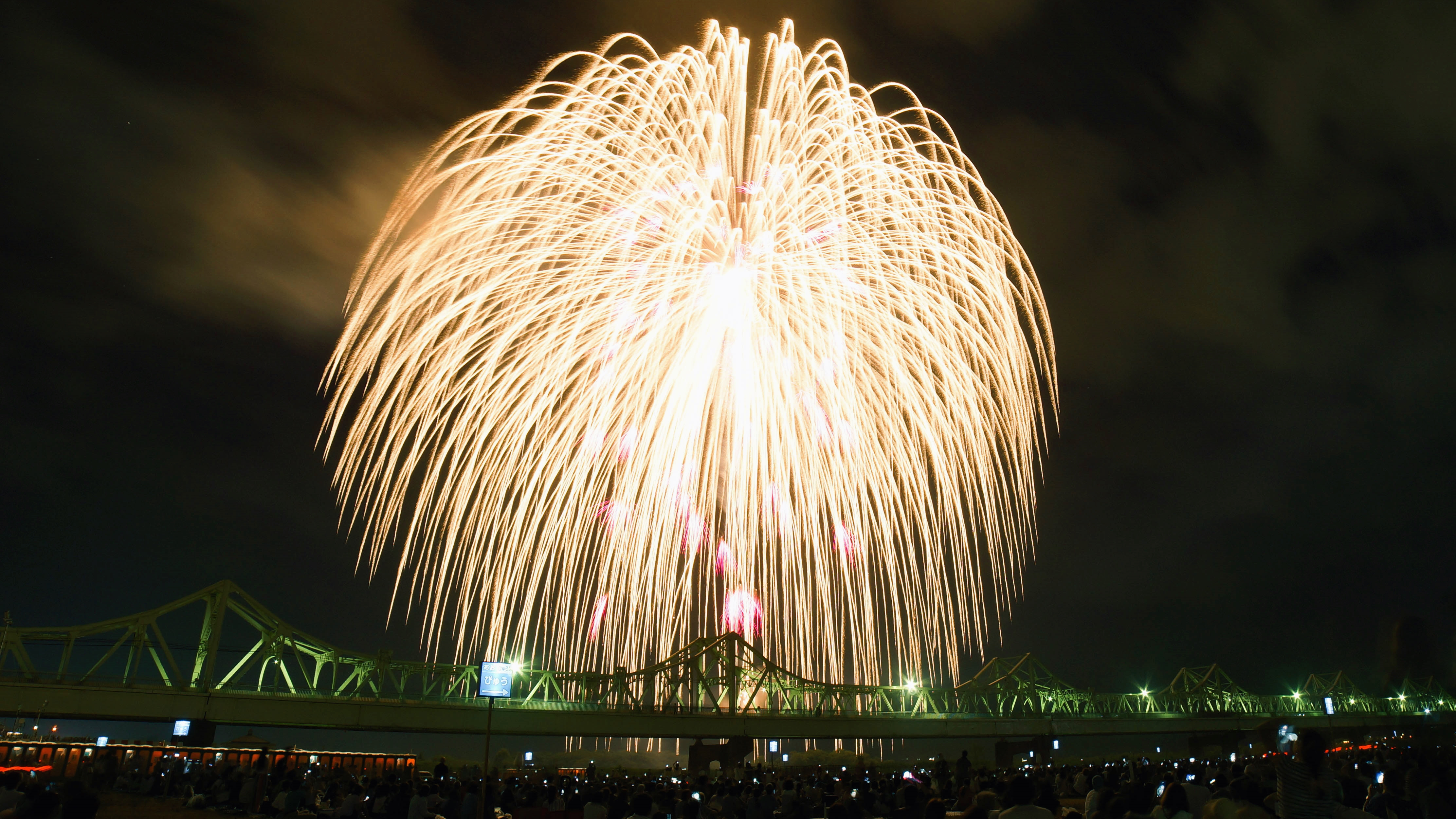 長岡まつり花火大会正三尺玉 Sony SLT-A57